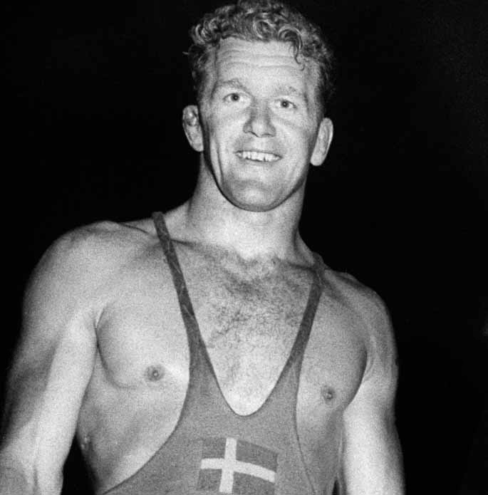 Bertil Antonsson